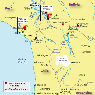 Sitios arqueológicos y ciudades relacionadas a la cultura Tiahuanaco.